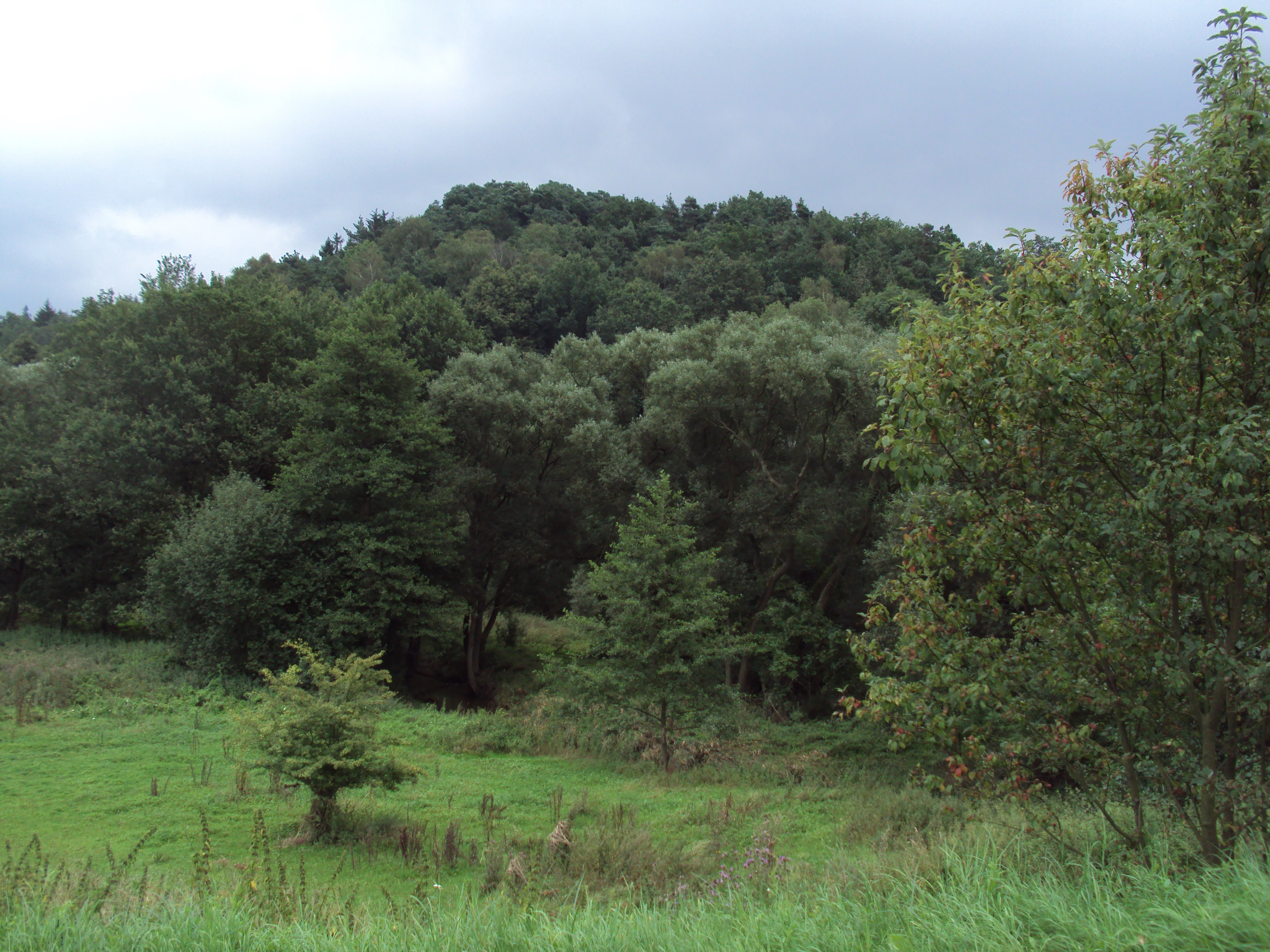 K obci Horní Libchava přiléhá vrch Vinný či Viničný, 302 m.n.m